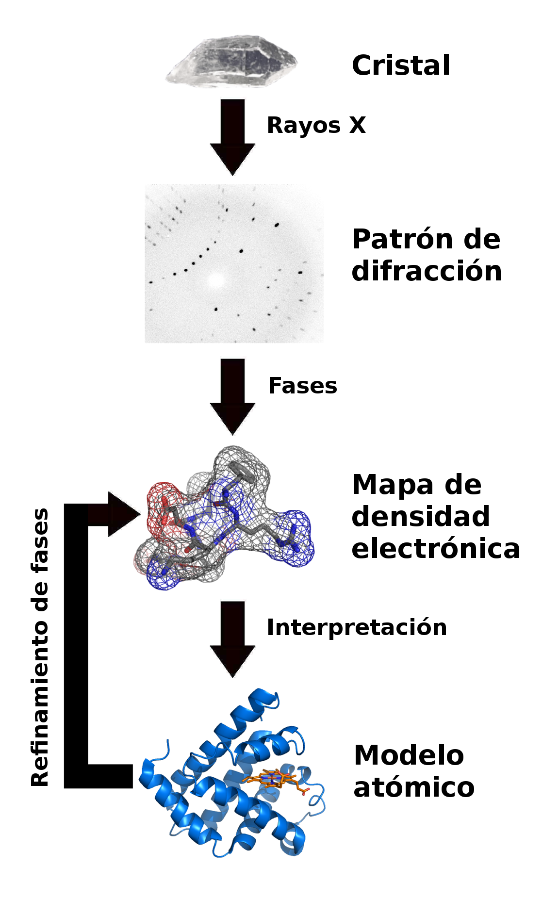 Pasos en el proceso de determinación de la estructura de una molécula por el método de cristalografía de rayos X